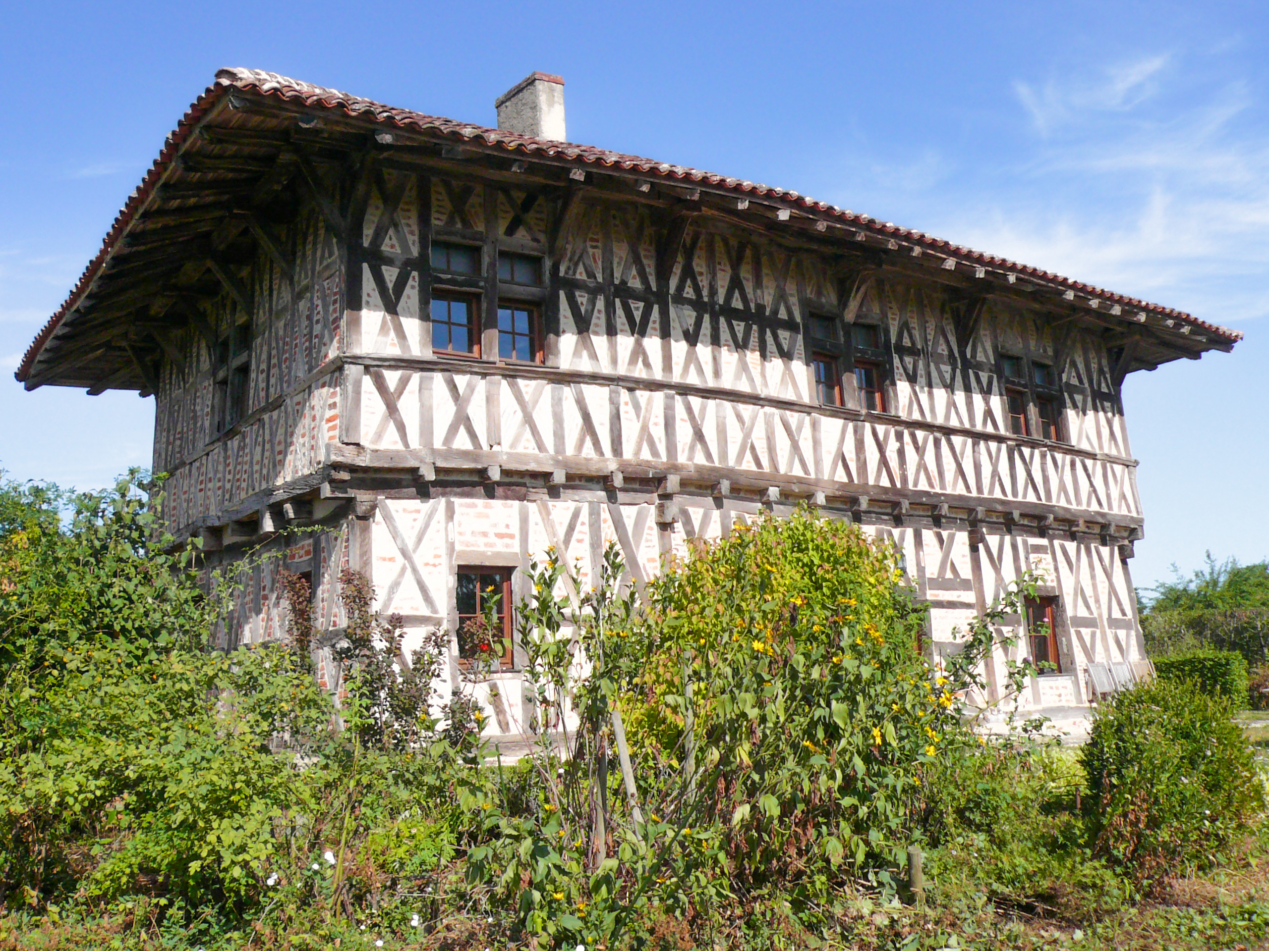 Vue de l'angle Sud Est du manoir